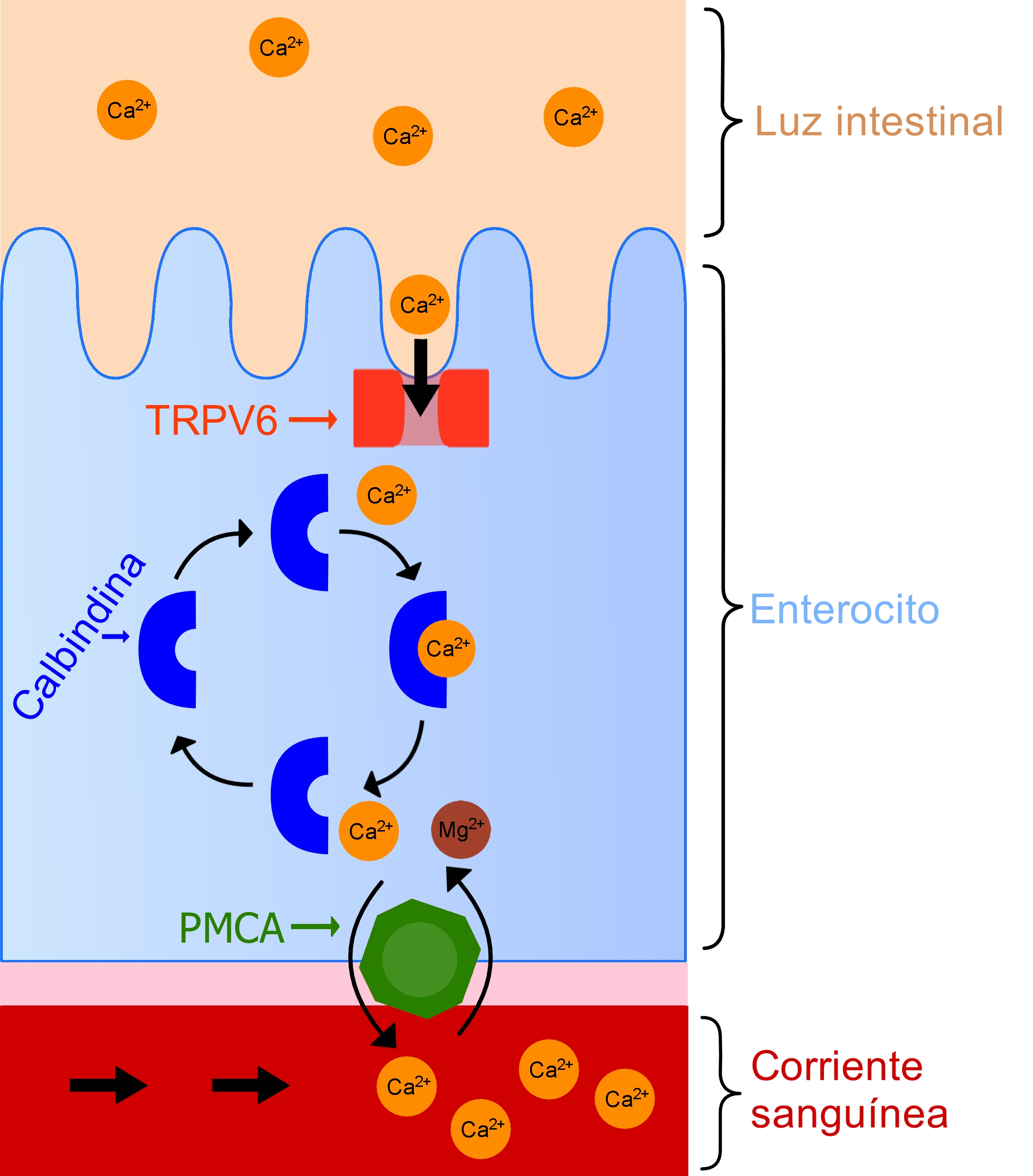 Esquema en el que se muestra el proceso de absorción de calcio en el tubo digestivo.